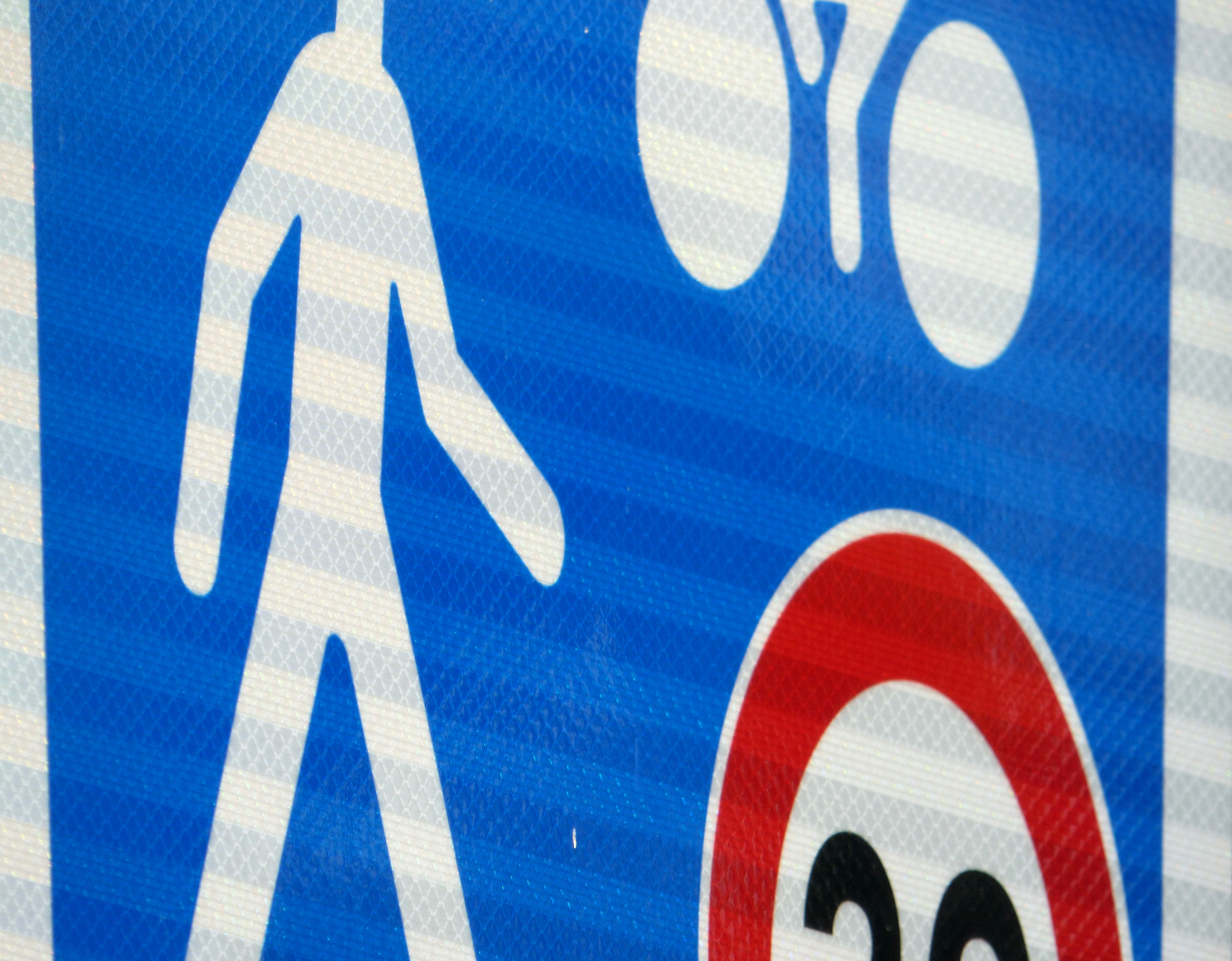 Un panneau de signalisation avec un revêtement rétroréfléchissant de classe 2.